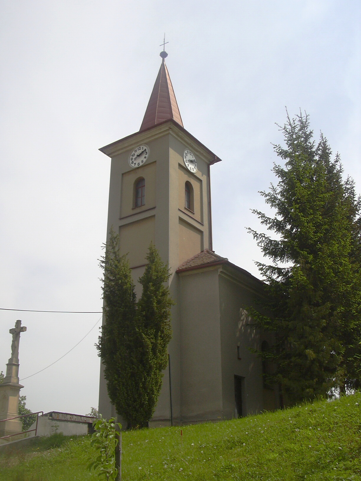 Kaple svatého Františka z Assisi, Medlovice (Vyškov District - Czech Republic)